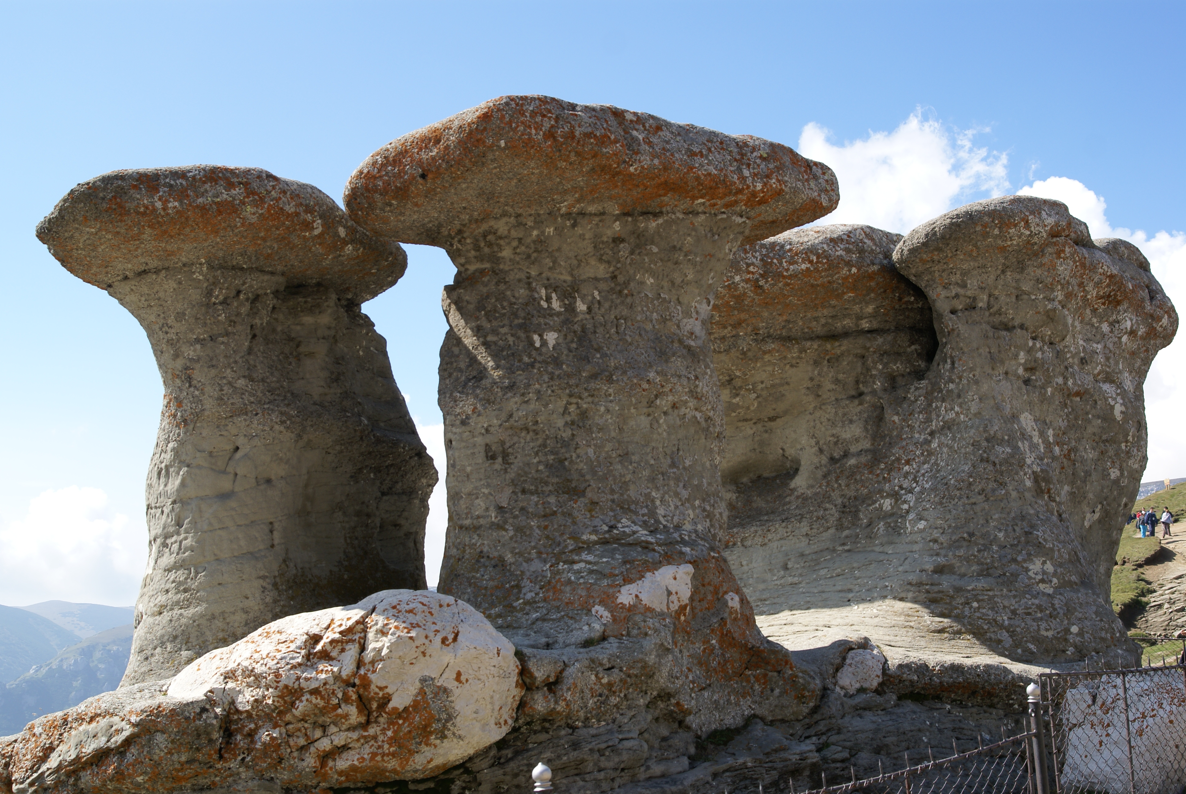 Monumento natural Babele - Poiana Brasov - Rumania